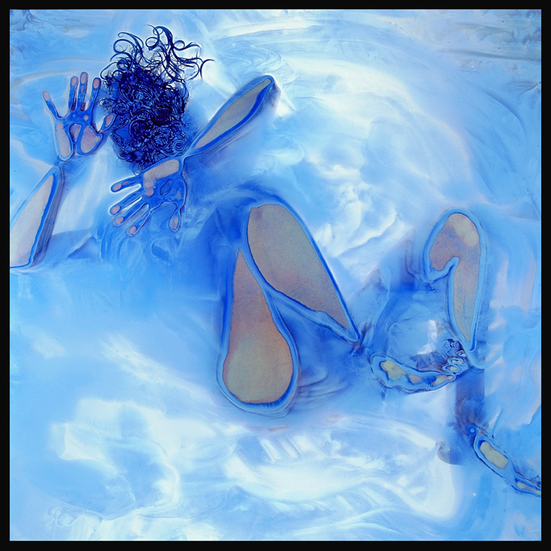 Ein Weiblicher Akt in blauer Farbe auf einer Glasscheibe